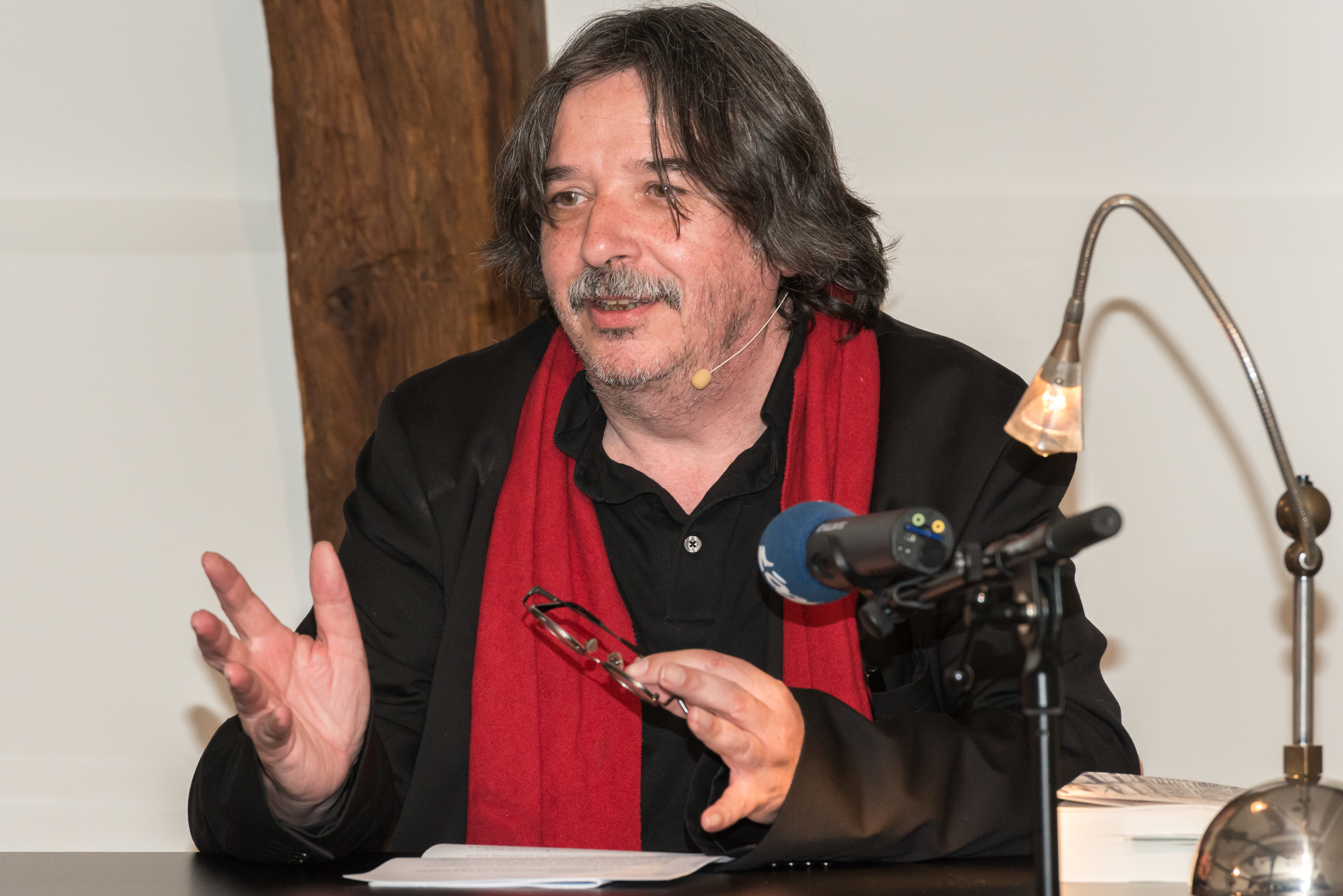 De Servais-Präis 2016 gouf de 4. Juli 2016 un de Jean Portante fir säi Roman L'architecture des temps instables, verginn. De Prix d'encouragement goung un de Luc van den Bossche fir d'Manuskript vu sengem Gedichtband Sans. No der Begréissung duerch d'Germaine Goetzinger, Presidentin vun der Fondatioun, huet de President vum Jury, Pierre Marson d'Motivatioun virgelies an de Staatssekretär fir Kultur Guy Arendt eng Usprooch gehalen. Den Eloge op de Luc van den Bossche gouf vun der Alexandra Fixmer virgedroen, d'Luefried op de Jean Portante vun der Tonia Raus. Duerno hunn d'Laureaten aus hire Wierker virgelies. Fir de musikaleschen Encadrement huet den argentinesche Bandoneón-Spiller César Stroscio gesuergt.